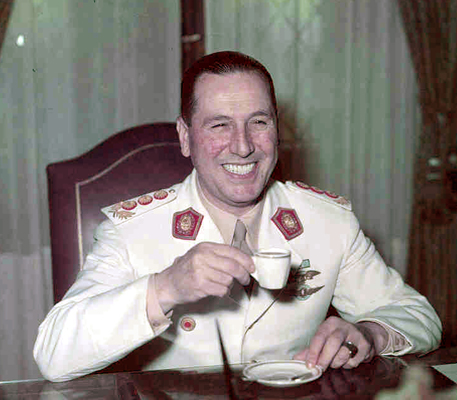 El general Juan Domingo Perón se toma un café